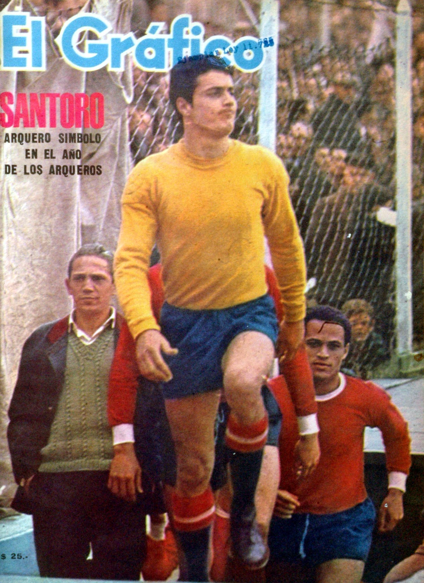 El Grafico del 06 de Enero de 1965. Edicion 2361